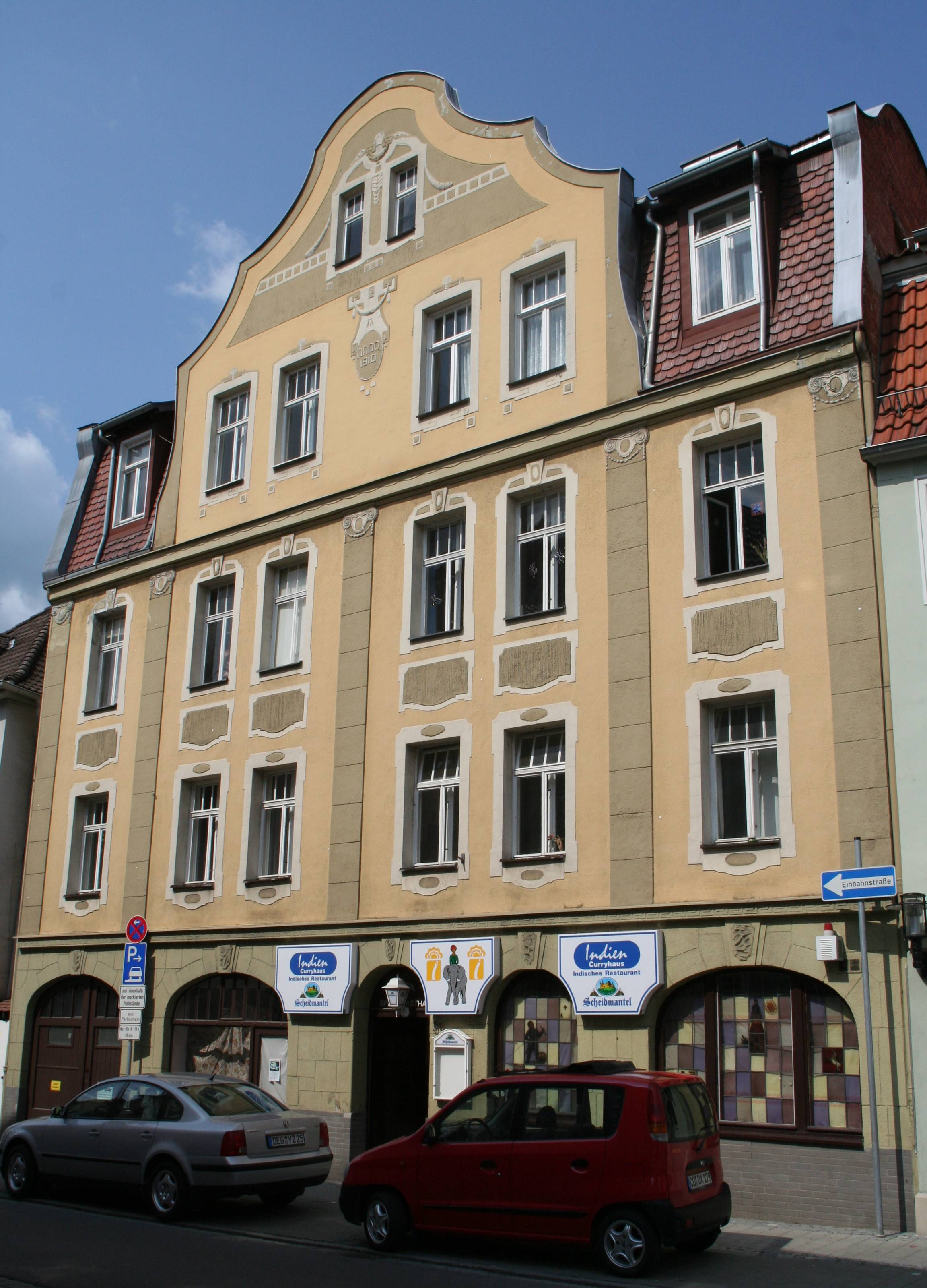 Judengasse 36 in Coburg